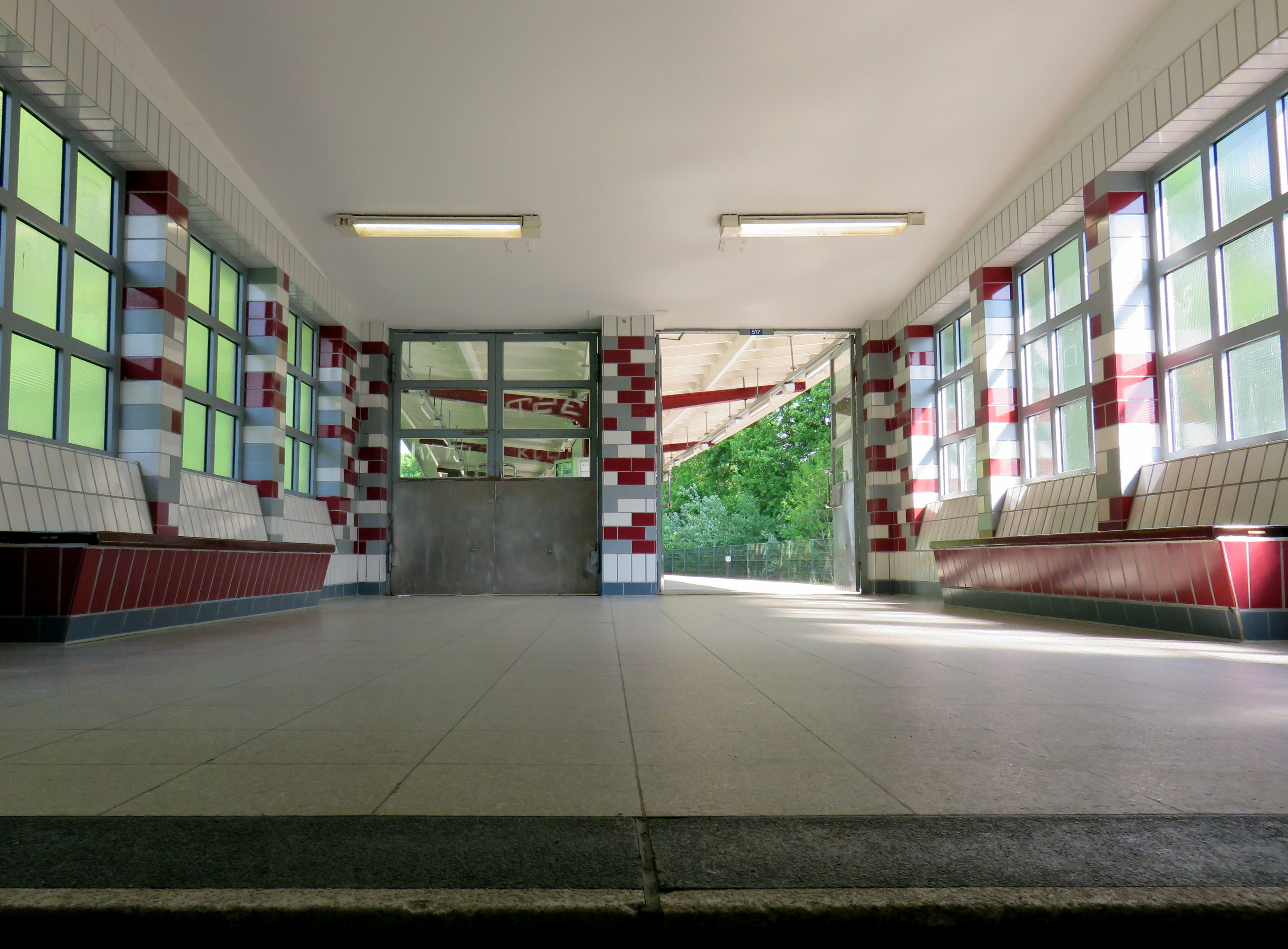 U-Bahnhof Klein Borstel im Hamburger Bezirk Nord, verwaltungsmäßig Stadtteil Ohlsdorf. Zustand Mai 2018.